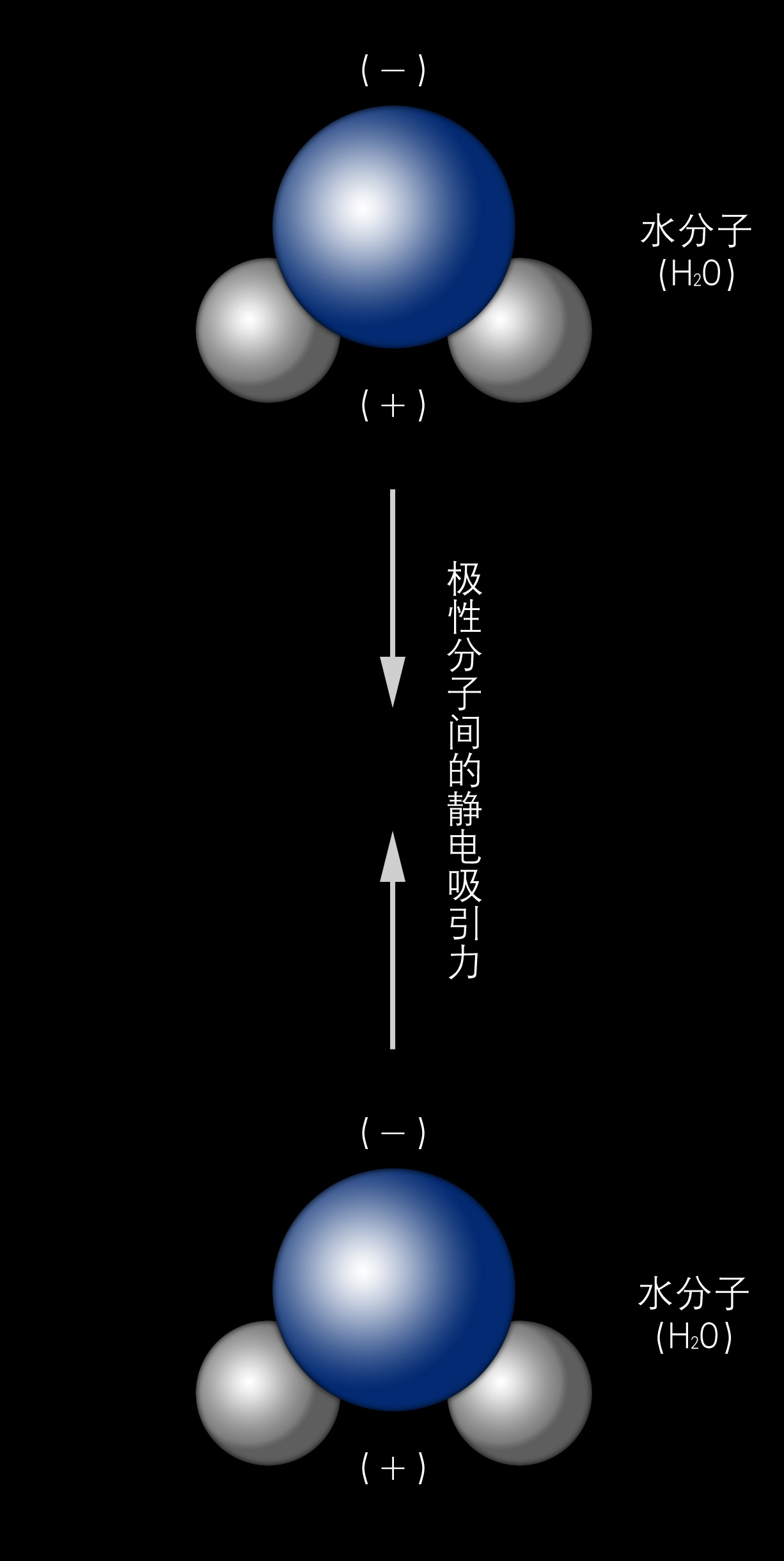 范德瓦耳斯力 （原图）重新制图。